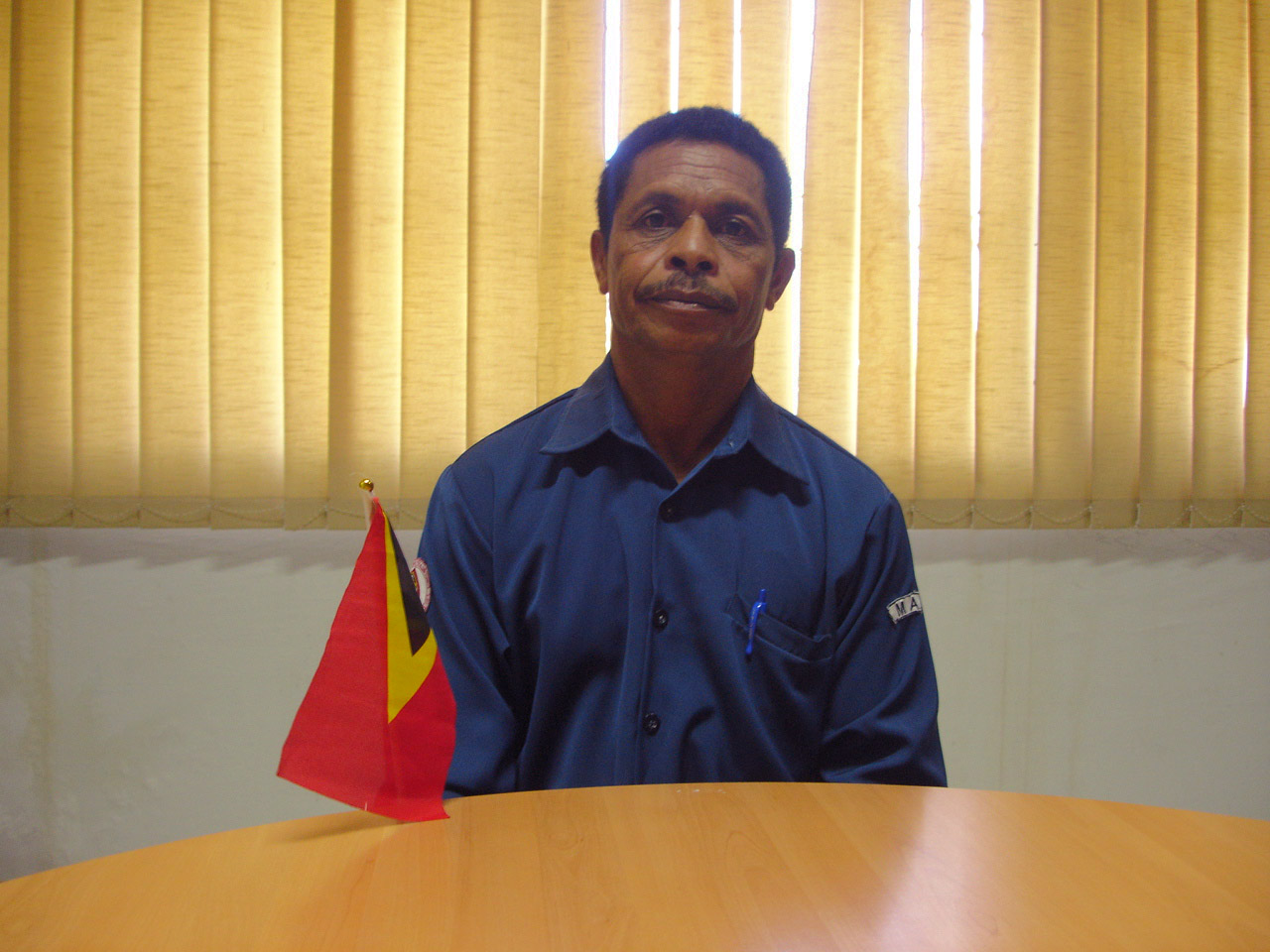 Carlos Carvalho de Araujo, Administrator des Subdistrikts Fohorem